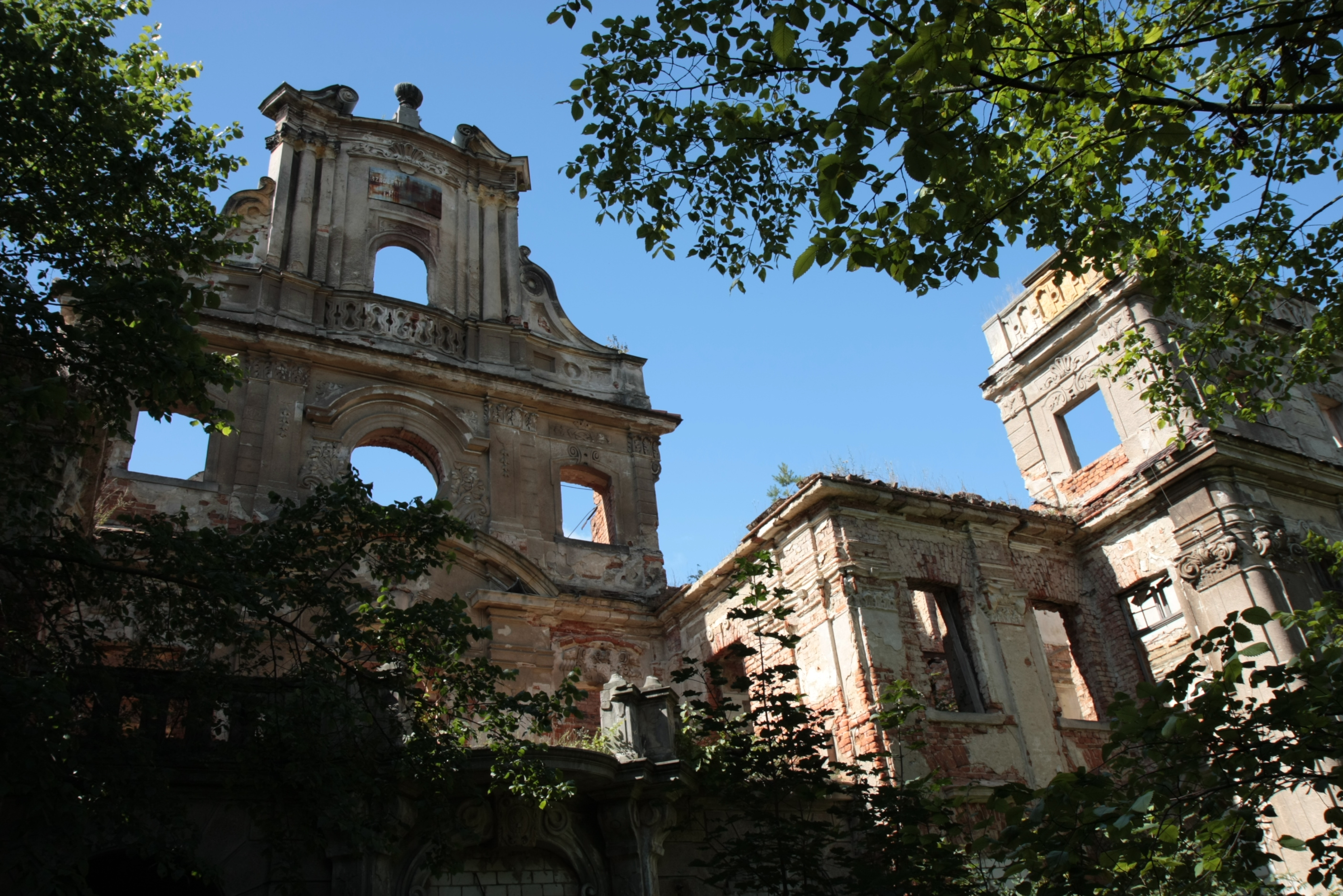 Ruiny Pałacu w Chróstniku (zabytek nr rejestr. A/2823/268)